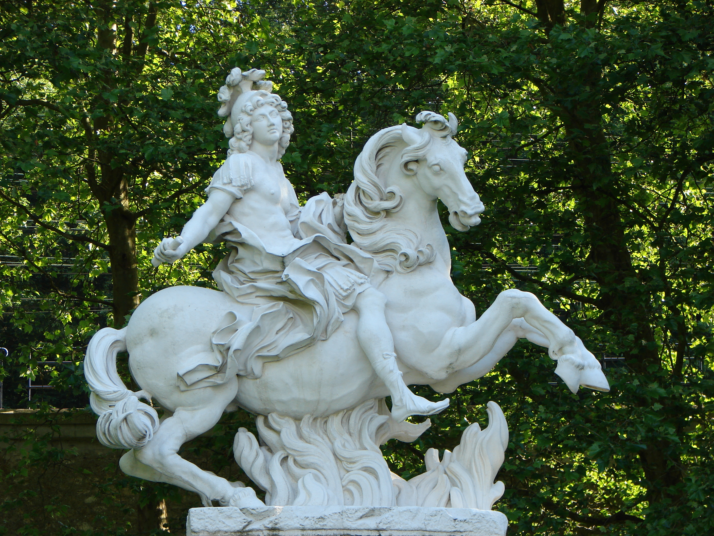 Sculpture en marbre de la Pièce d'eau des suisses située à l'extérieur du Château de Versailles